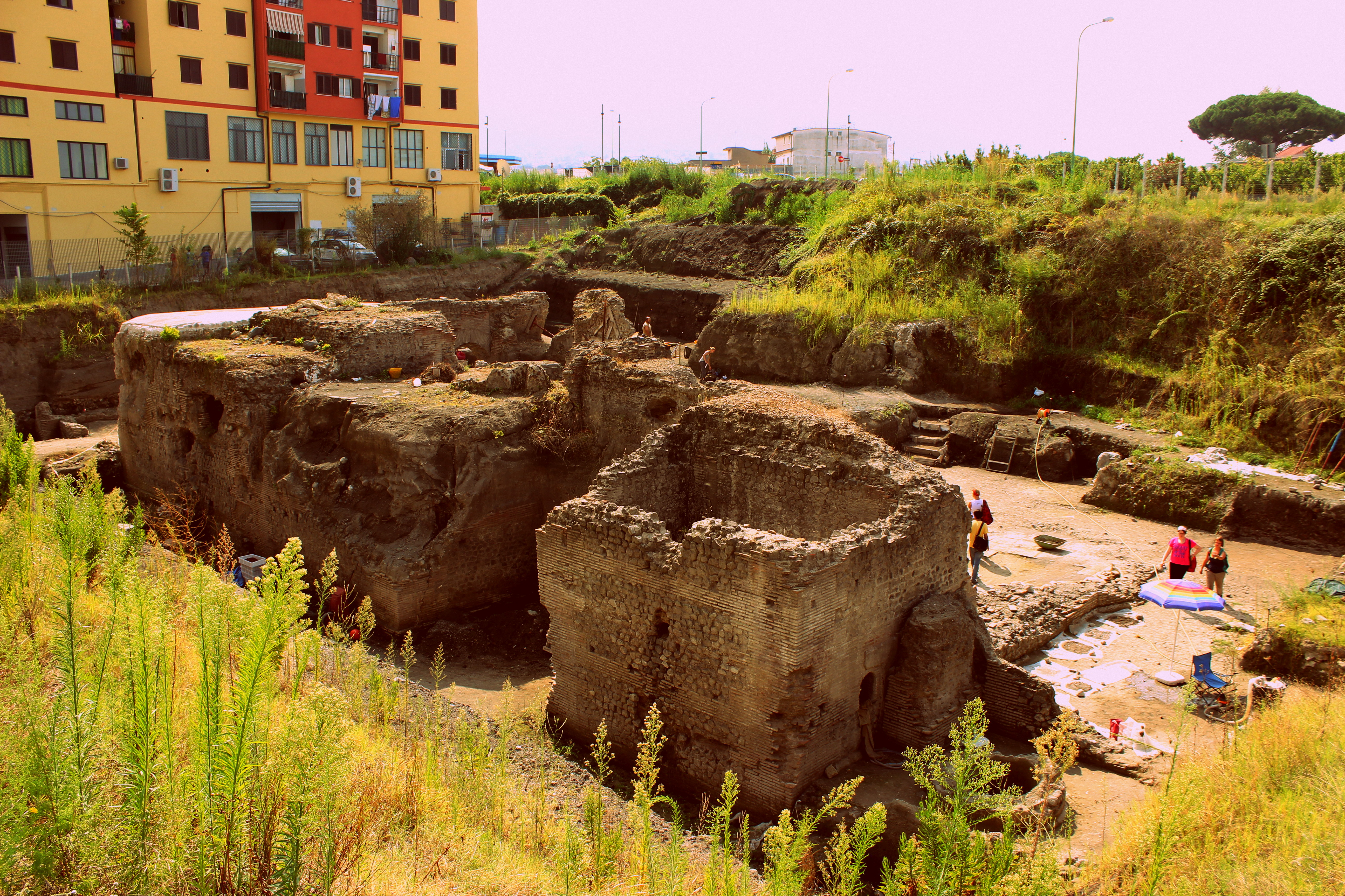 Scavi a Pollena Trocchia